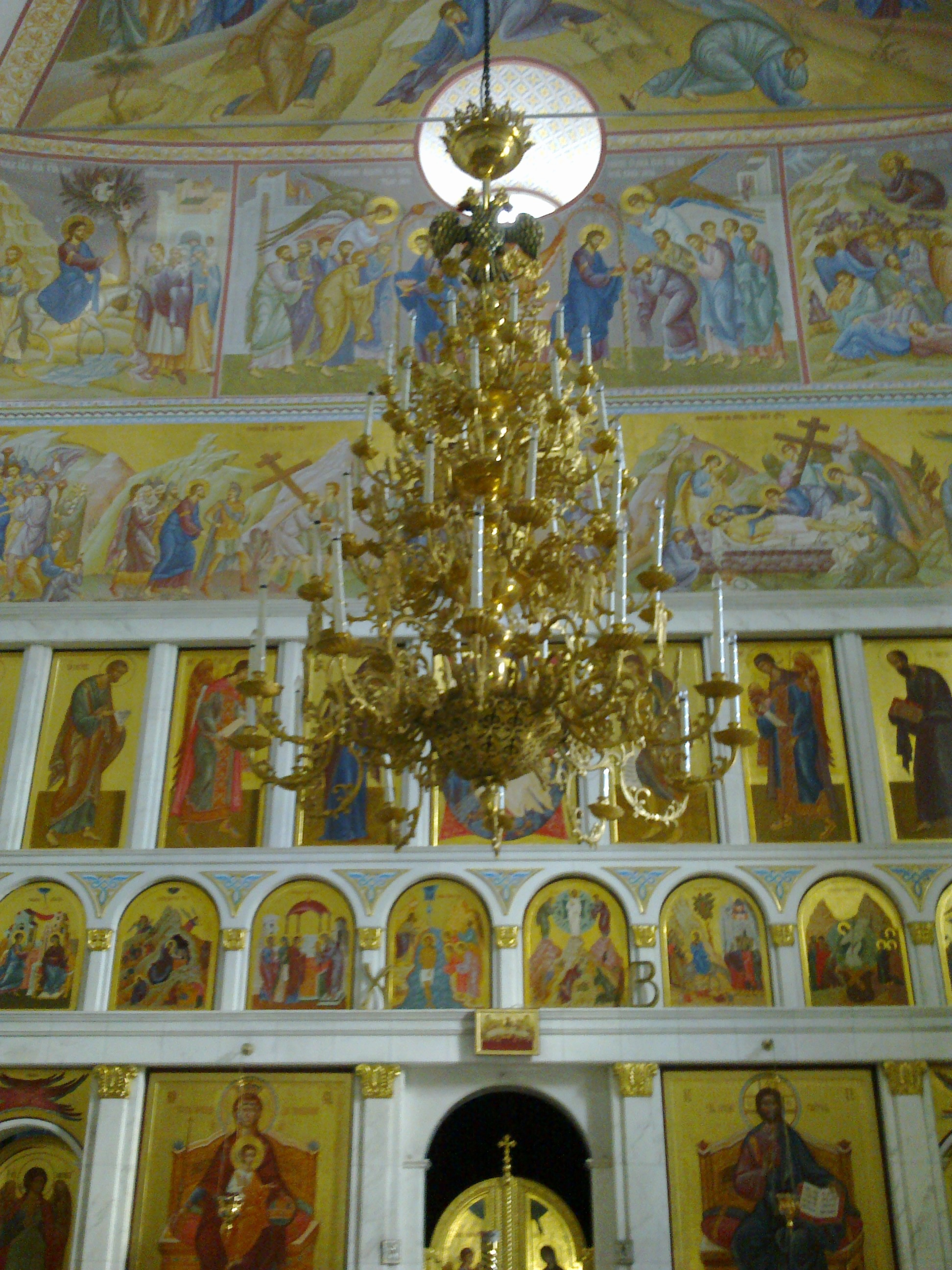 Церковь (Свердловская область, Екатеринбург, улица Походная, 2)